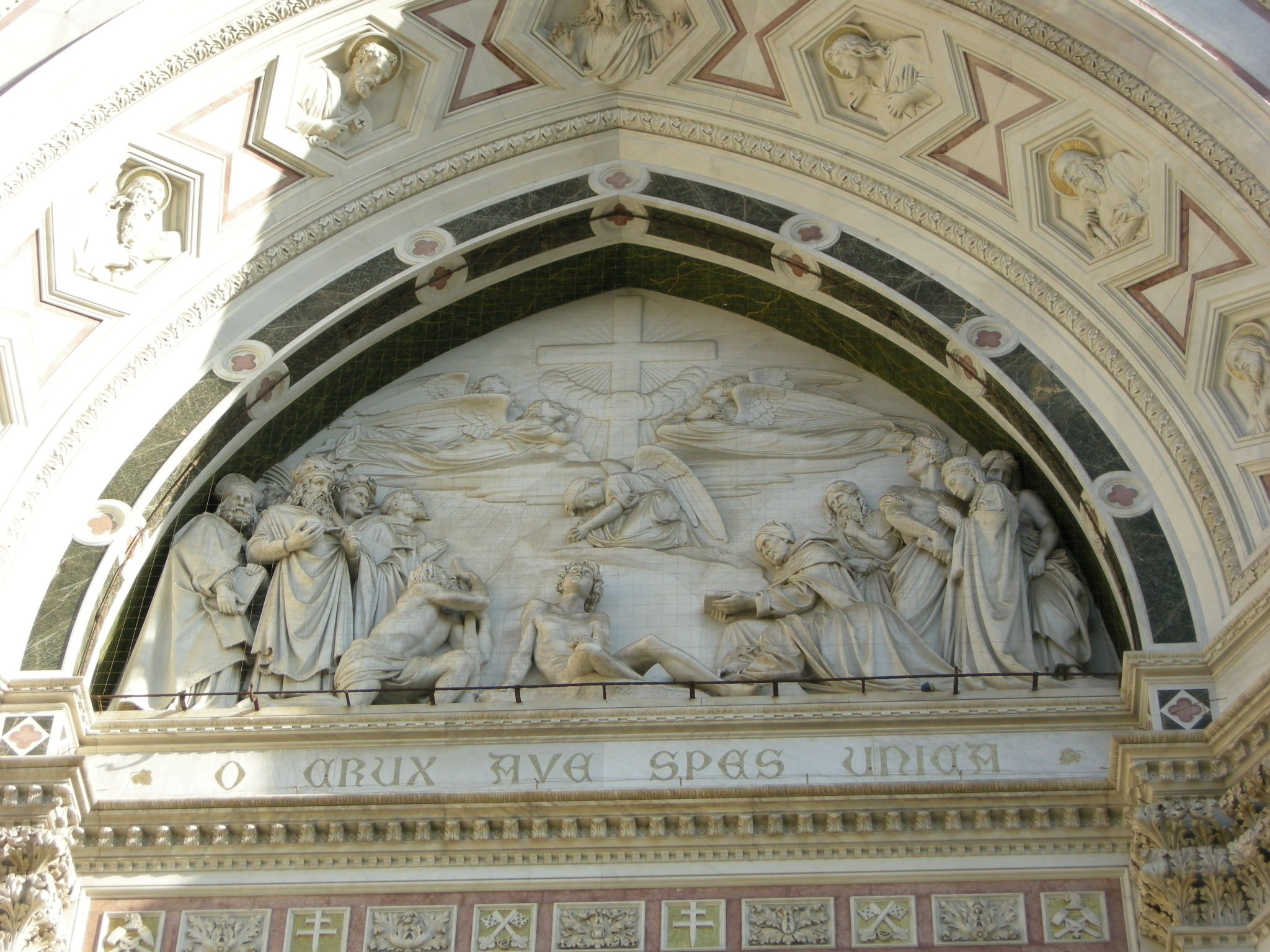 Facciata di santa croce, 02 trionfo della croce di giovanni duprè